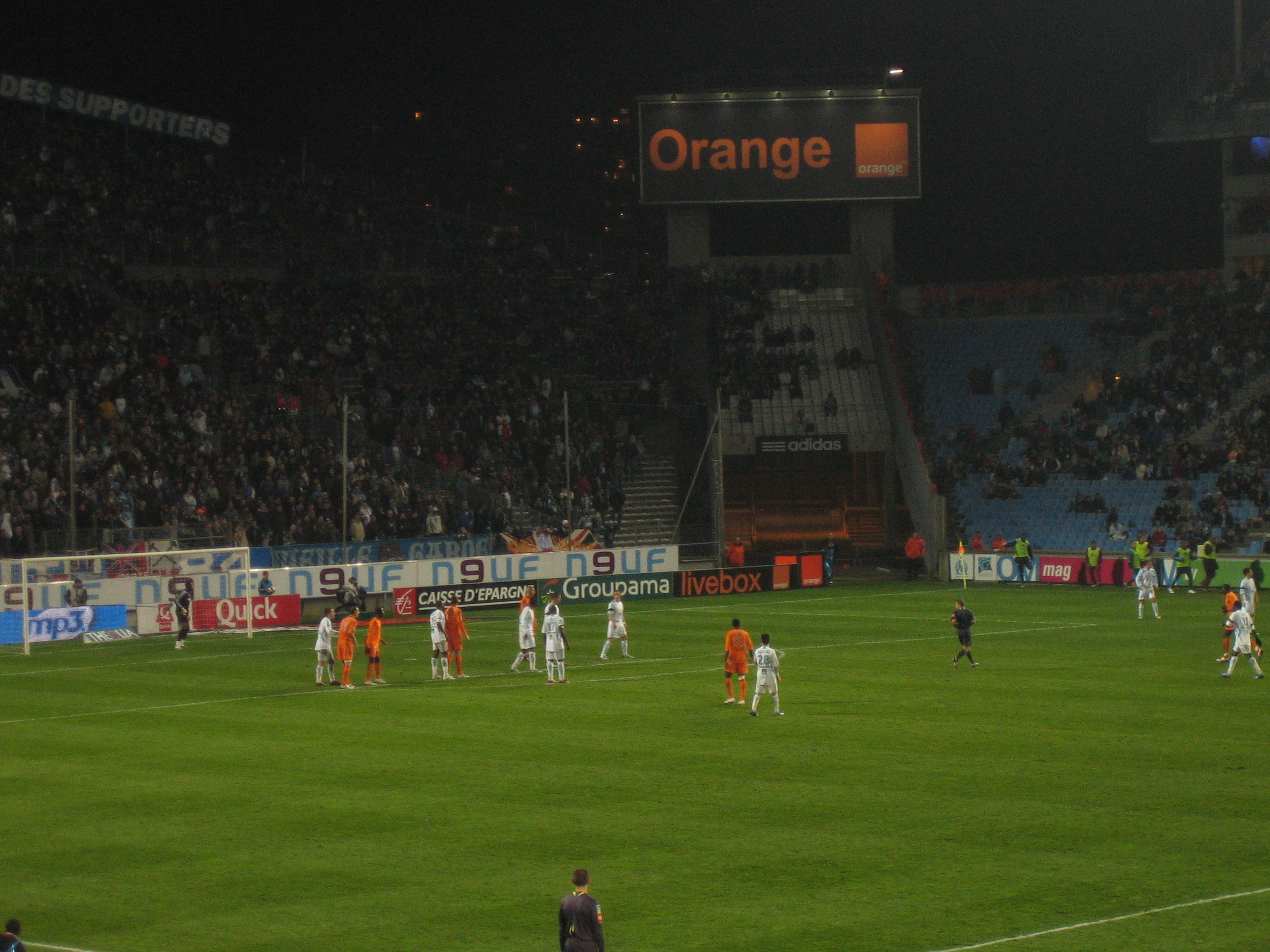 OM Metz 2007